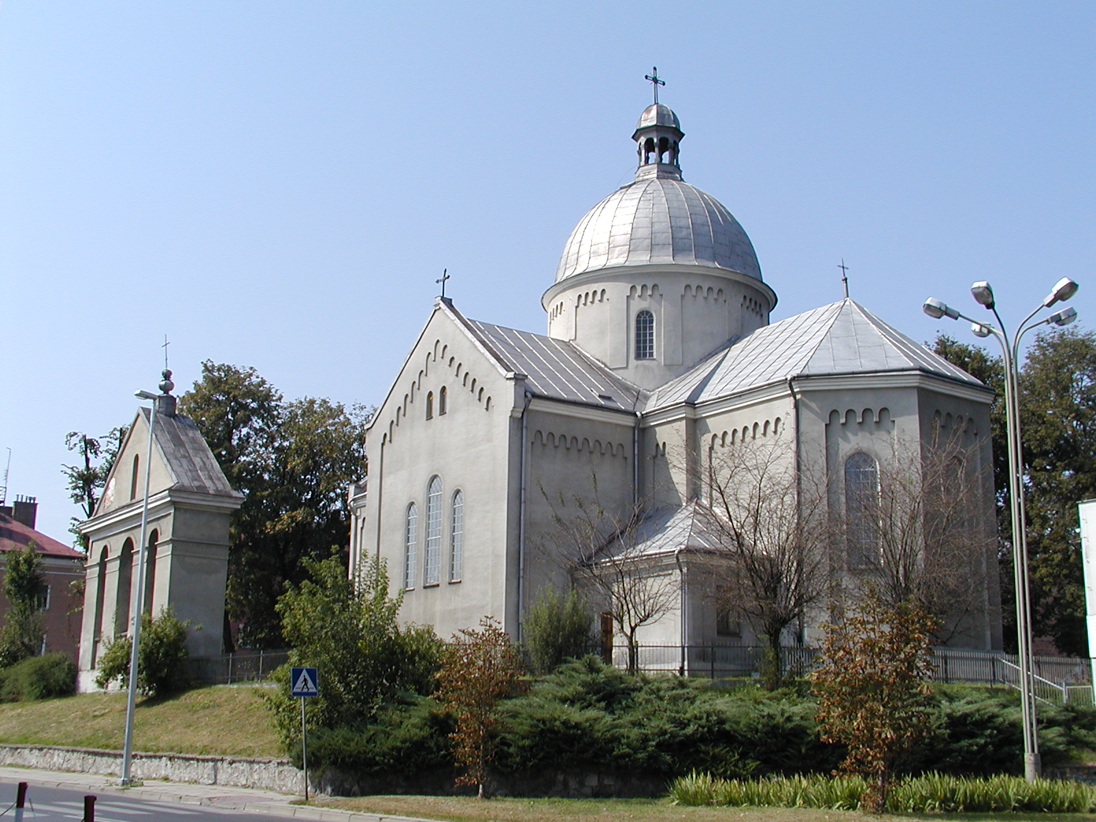 Cerkiew św. Mikołaja Cudotwórcy w Lubaczowie